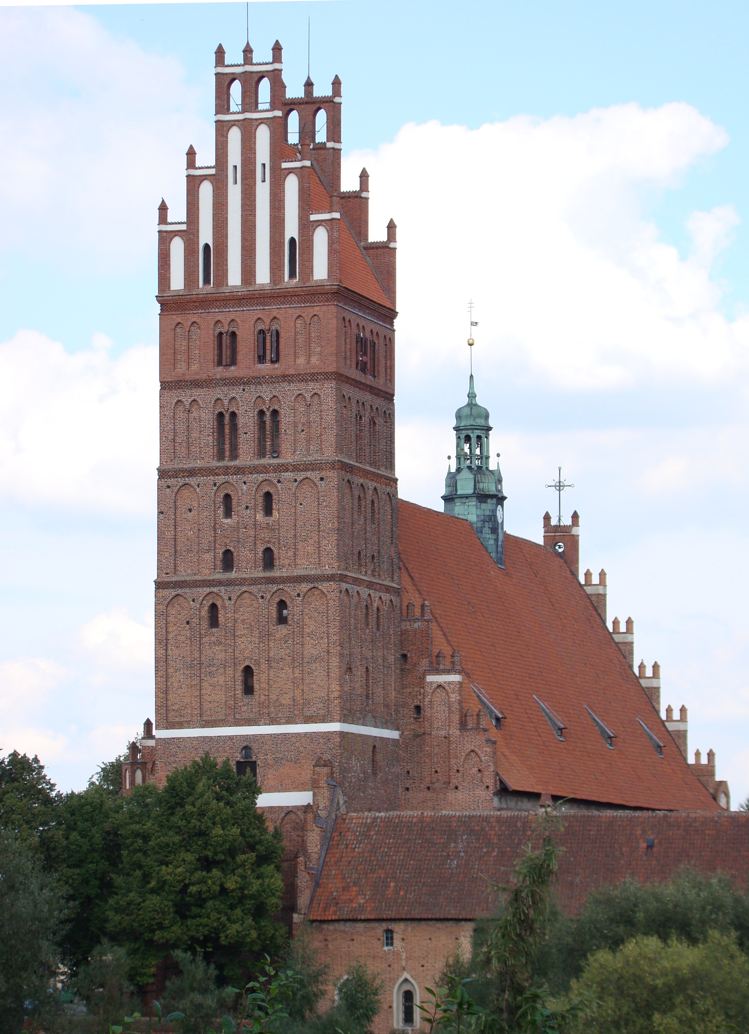 Dobre Miasto, ul. Orła Białego 30 - kolegiata p.w. Zbawiciela i Wszystkich Świętych, 1376-1789, XV/XVI, 1895